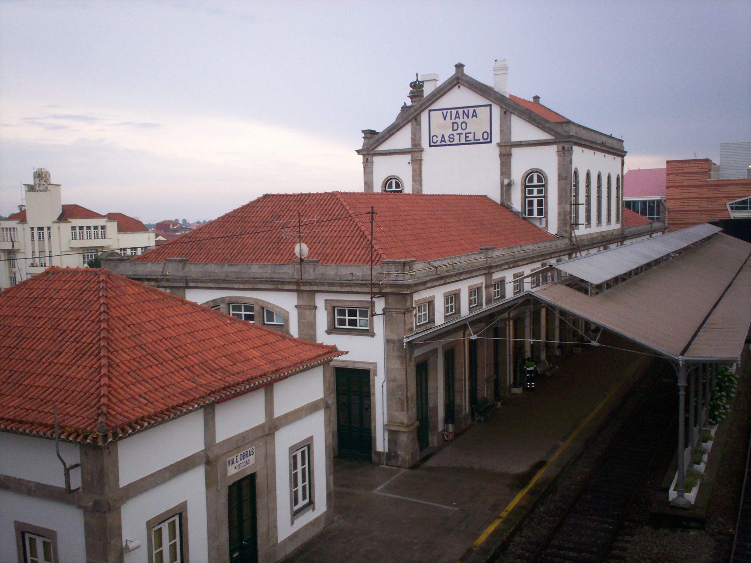 Estação de Comboios de Viana do Castelo This file was uploaded for Wiki Loves Monuments in Portugal with the unique identifier 97021874.